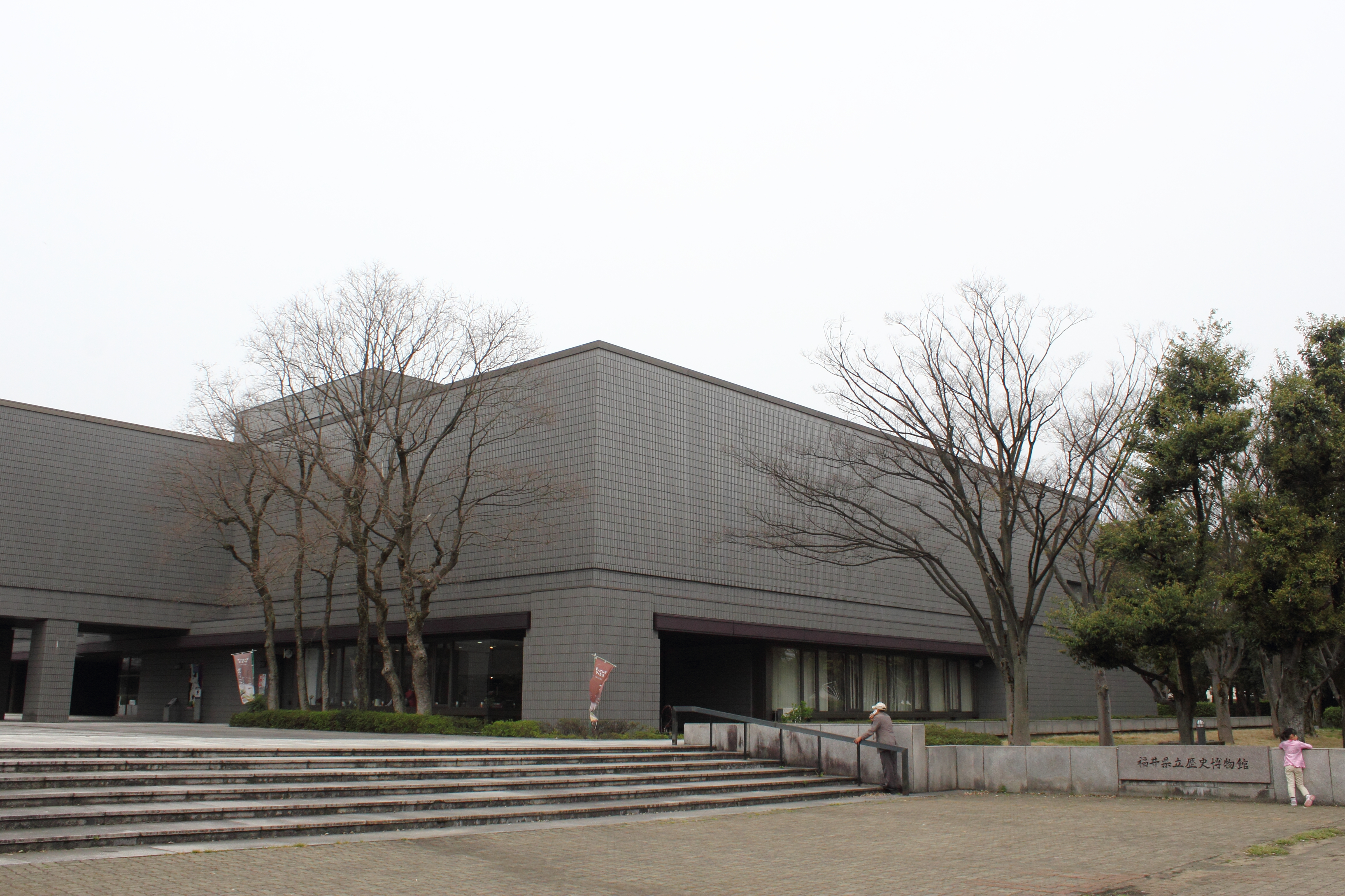 福井県立歴史博物館